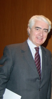 Gustavo Suárez Pertierra; Fanny Castro-Rial y Miriam González Rabanal, miembros del comité científico y organizador del Congreso, con Mayor Zaragoza